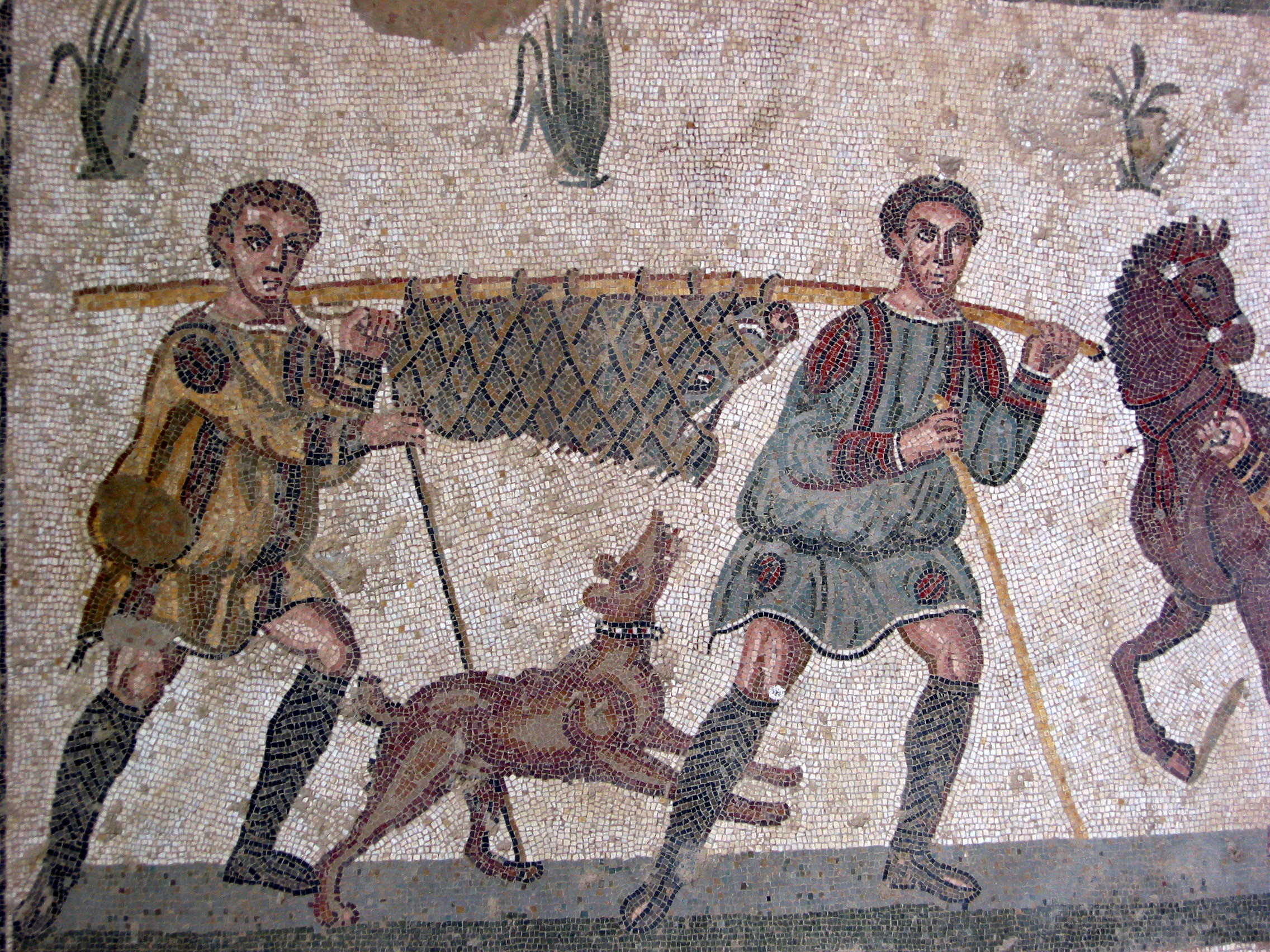 Villa Romana del Casale, Piazza Armerina, Sicily/Sicilia, Italy/Italia